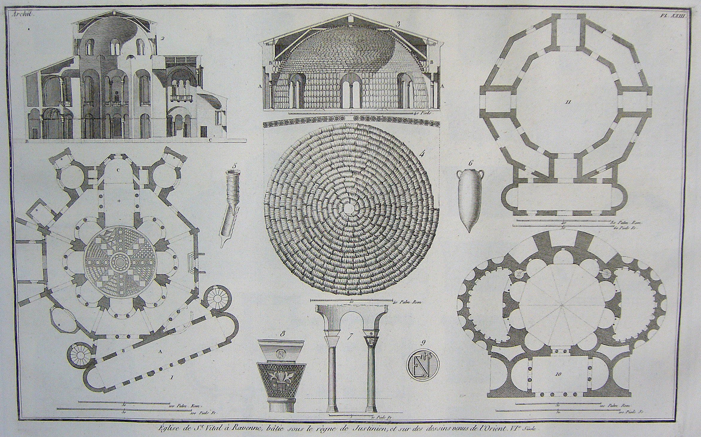 Seroux d'Agincourt, Architecture, Planche XXIII